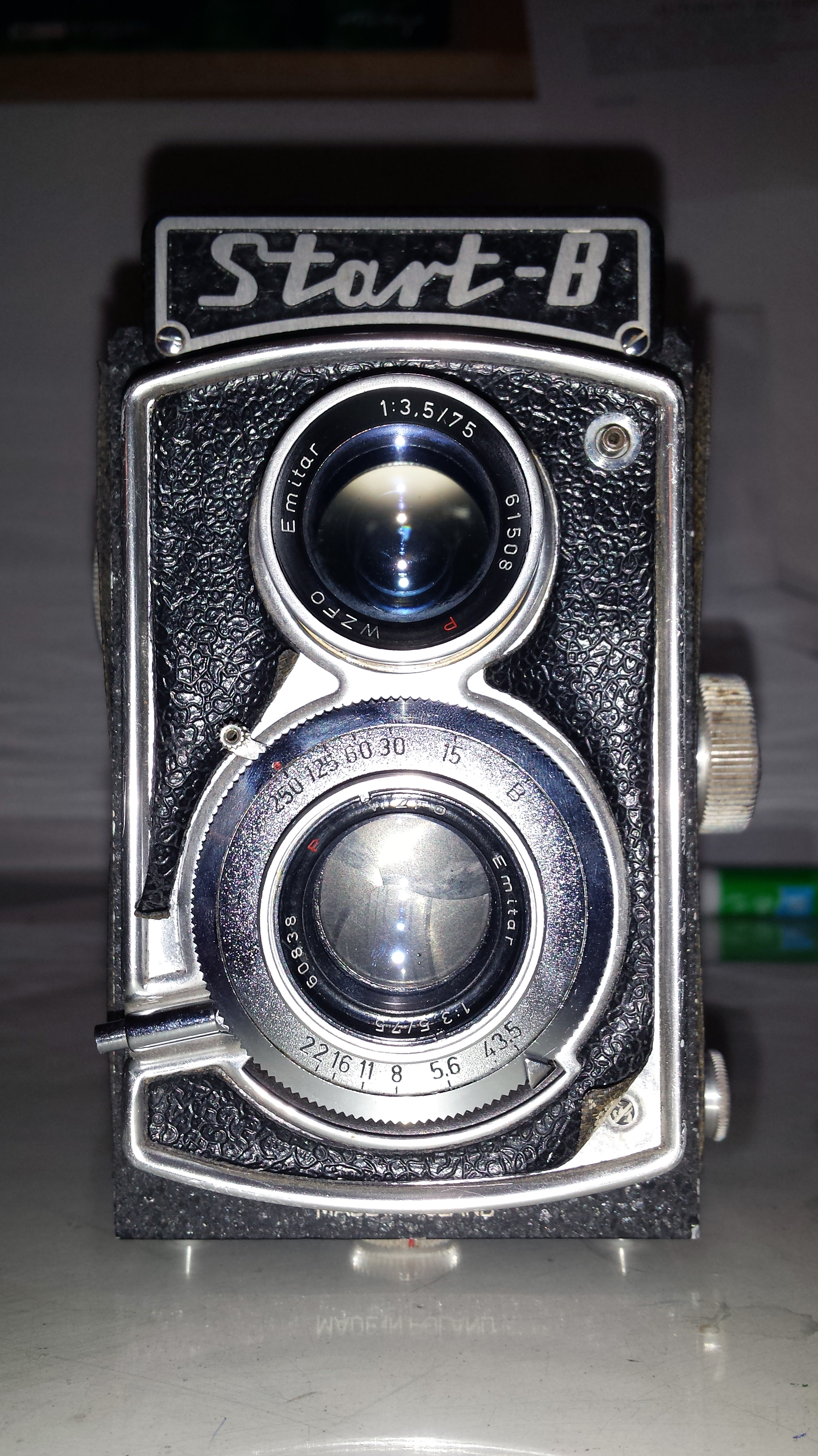 Stara polska lustrzanka dwuobiektywowa Start-B (obiektyw górny służący do podglądu)